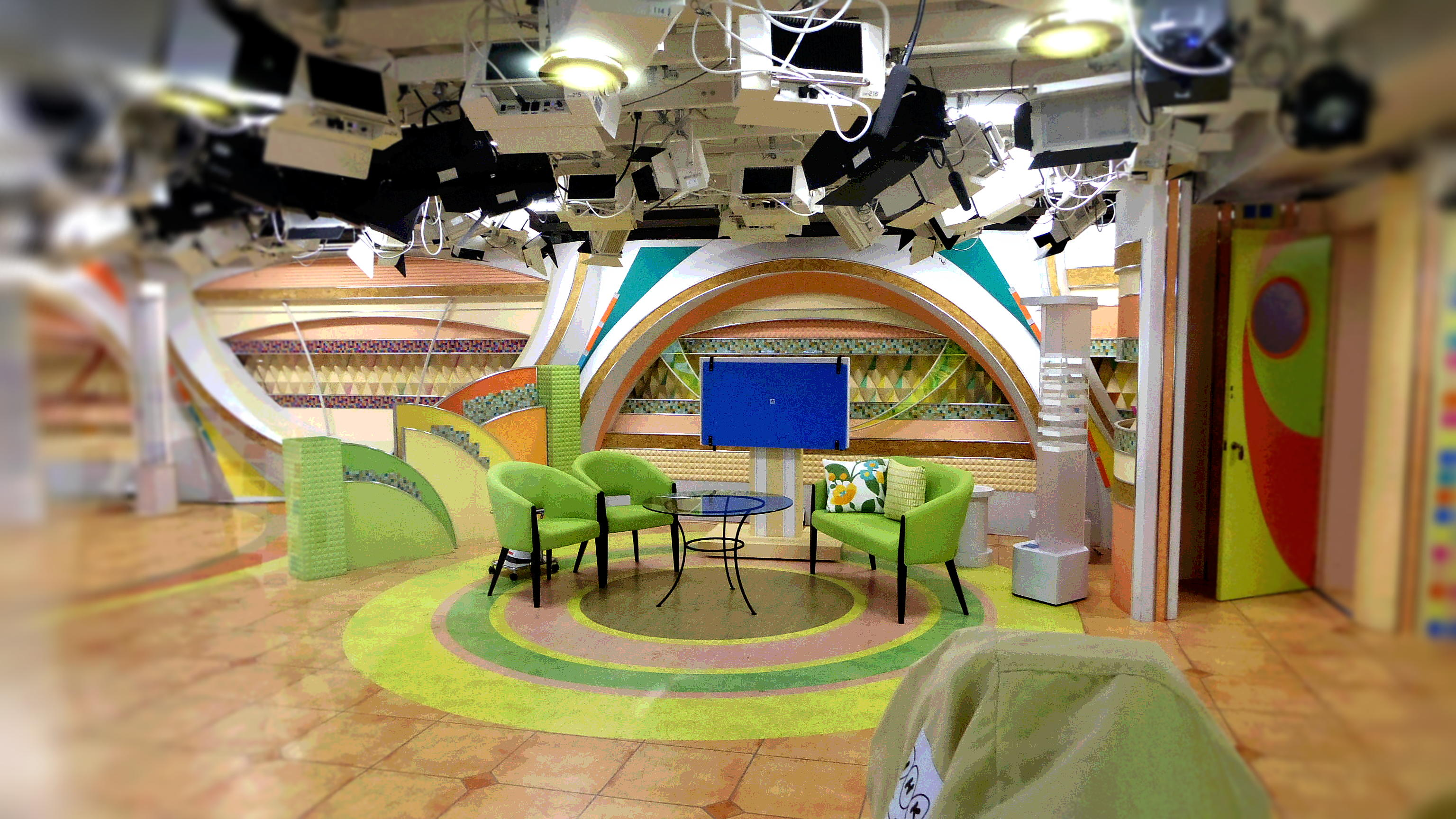 2015年11月3日、渋谷・NHKスタジオパーク「CT-450」スタジオ前の窓ガラスから撮影。この日は祝日のため生放送番組がなかった。（なお、生放送中は撮影禁止である）当時の同スタジオからの放送番組は『スタジオパークからこんにちは』（ - 2017年3月）と、現在も放送されている『土曜スタジオパーク』。2017年4月から2018年3月までは『4時も!シブ5時』も放送された。 撮影：ITA-ATUスタジオ所有：NHK Paintgraphic3にて加工・編集。